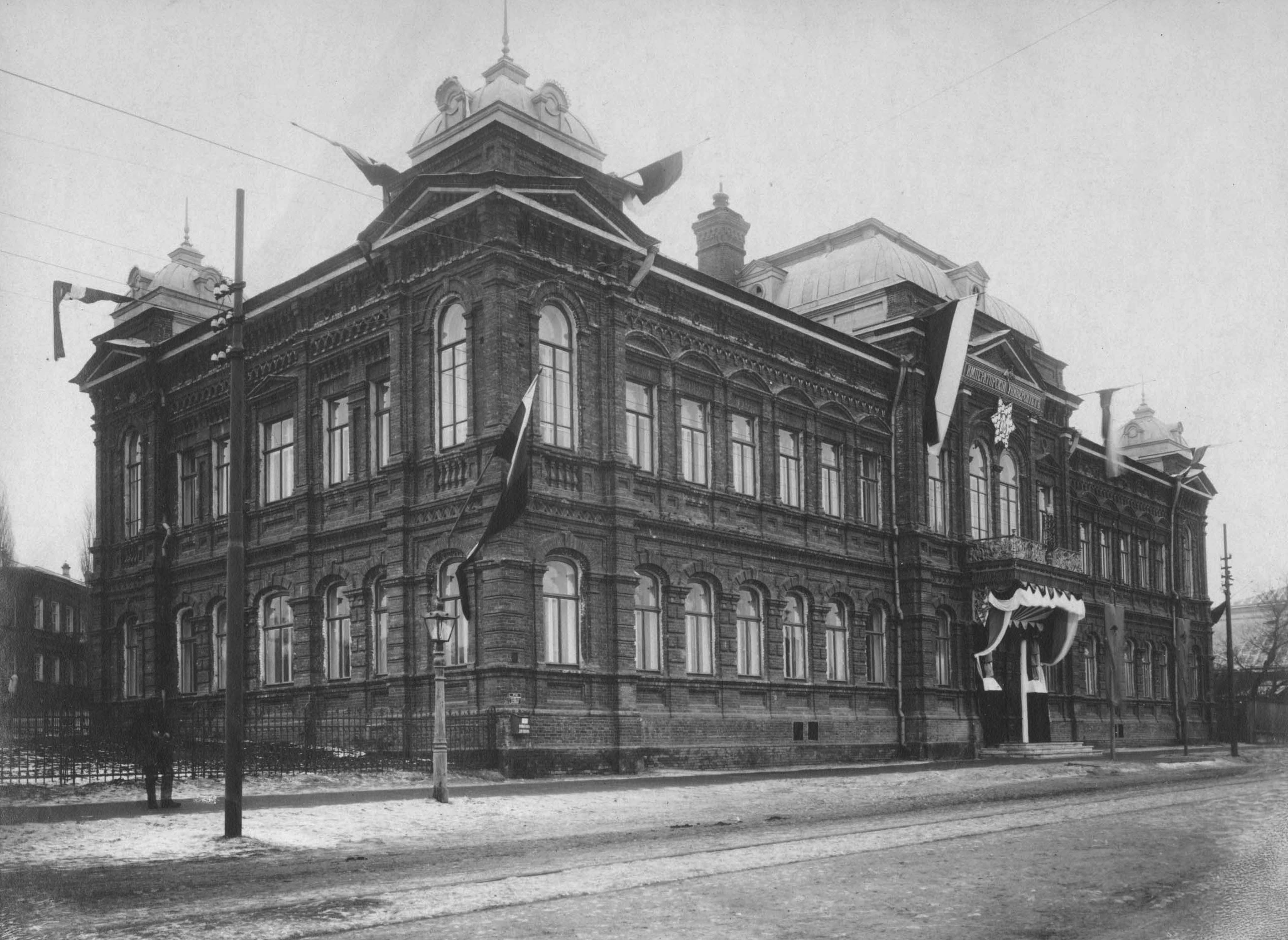 Открытие Саратовского государственного университета в здании фельдшерской школы